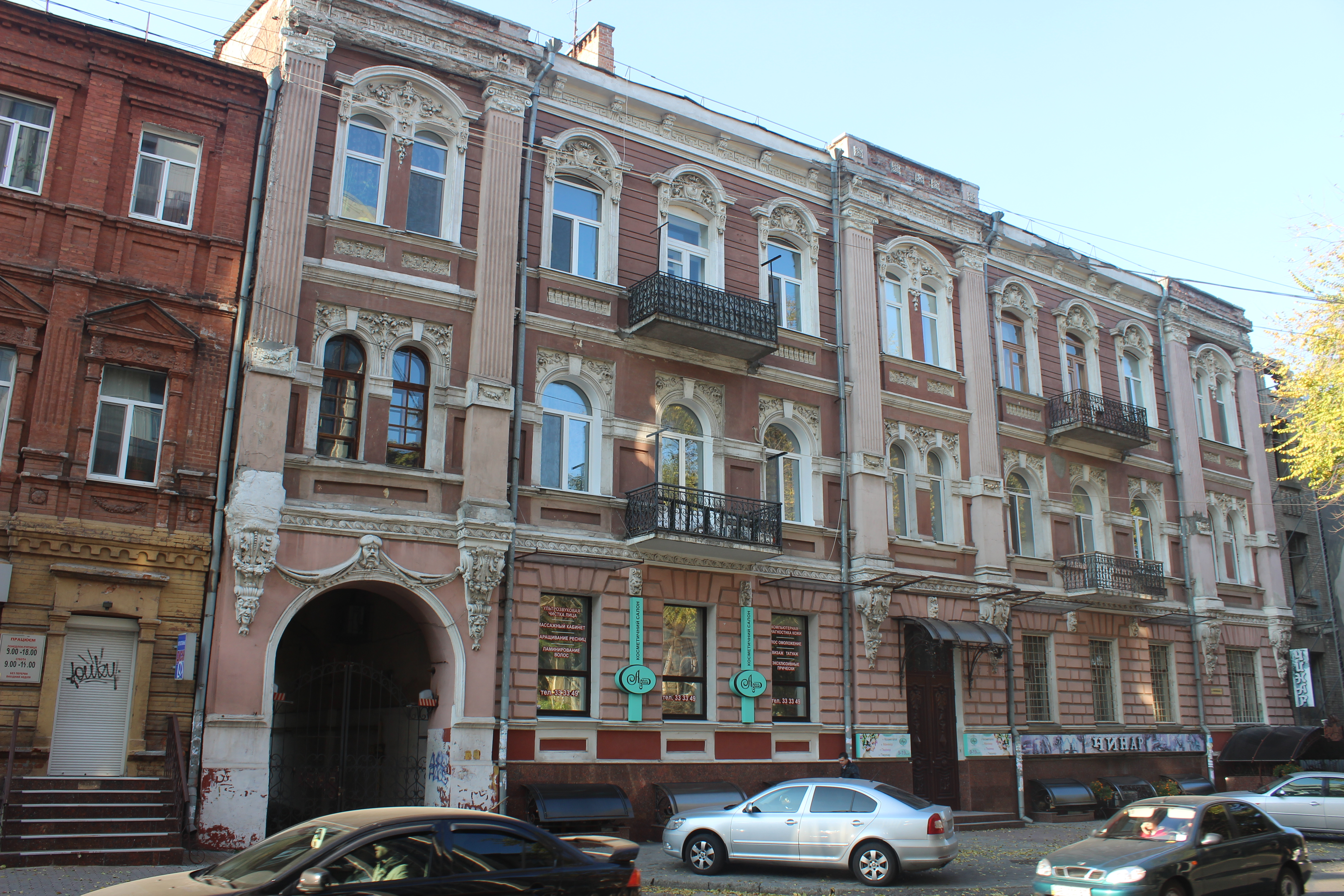 Доходний будинок Заморуєва, Дніпро, вул. Старокозацька, 15